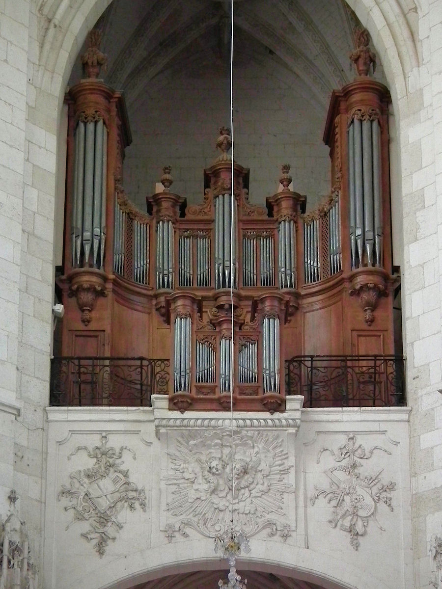 À Saint-Riquier (Somme, Picardie, France), dans l'abbatiale Saint-Riquier, orgue provenant du couvent des Prémontrés de Chartreuve, transféré et agrandi par Louis Labour en 1731 & 1748, restauré par les frères Basiliens de l'abbaye de Valloires en 1853, puis par Séquiès en 1925, modifié par Edmond Alexandre Roethinger en 1961; il a été restauré en 2005 par Laurent Plet.